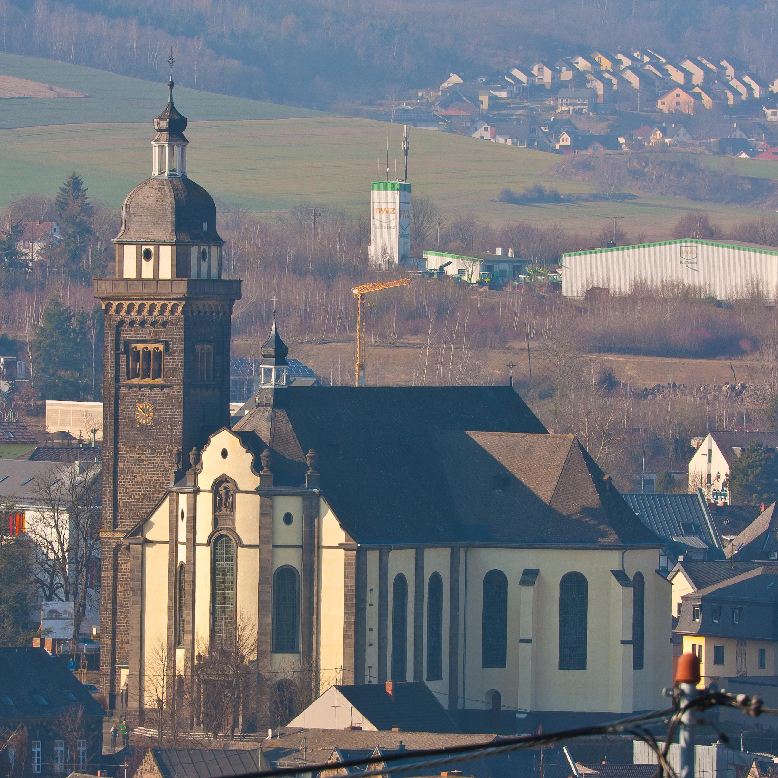 Blick auf St. Dionysius vom Wingertsberg